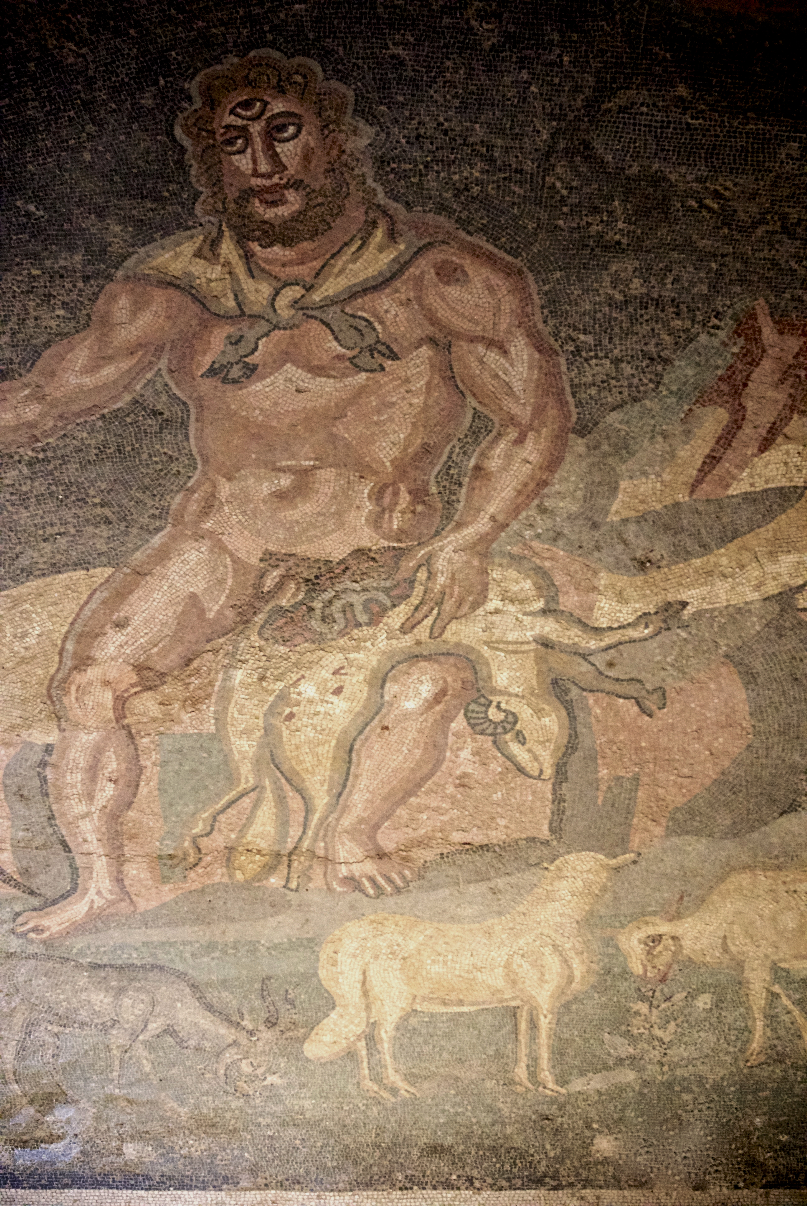 La scène représente un épisode de l'Odyssée d'Homère. Ulysse et ses compagnons sont dans la caverne de l'Etna habitée par le cyclope Polyphême. Il lui offre du vin pour l'ennivrer et fuir accroché au ventre des moutons.